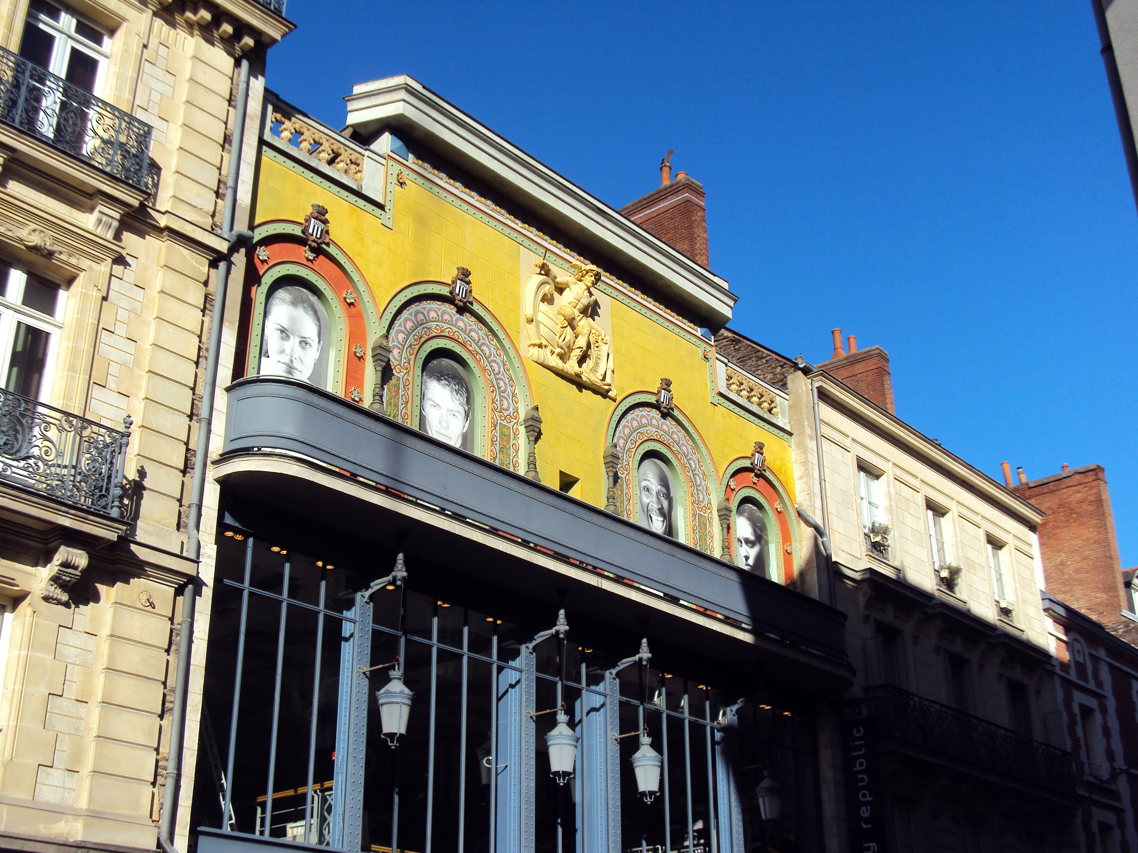 Les immeubles de la rue d'Antrain à Rennes (Ille-et-Vilaine / France) - Au n°9, l'ancien magasin Valton - 2012